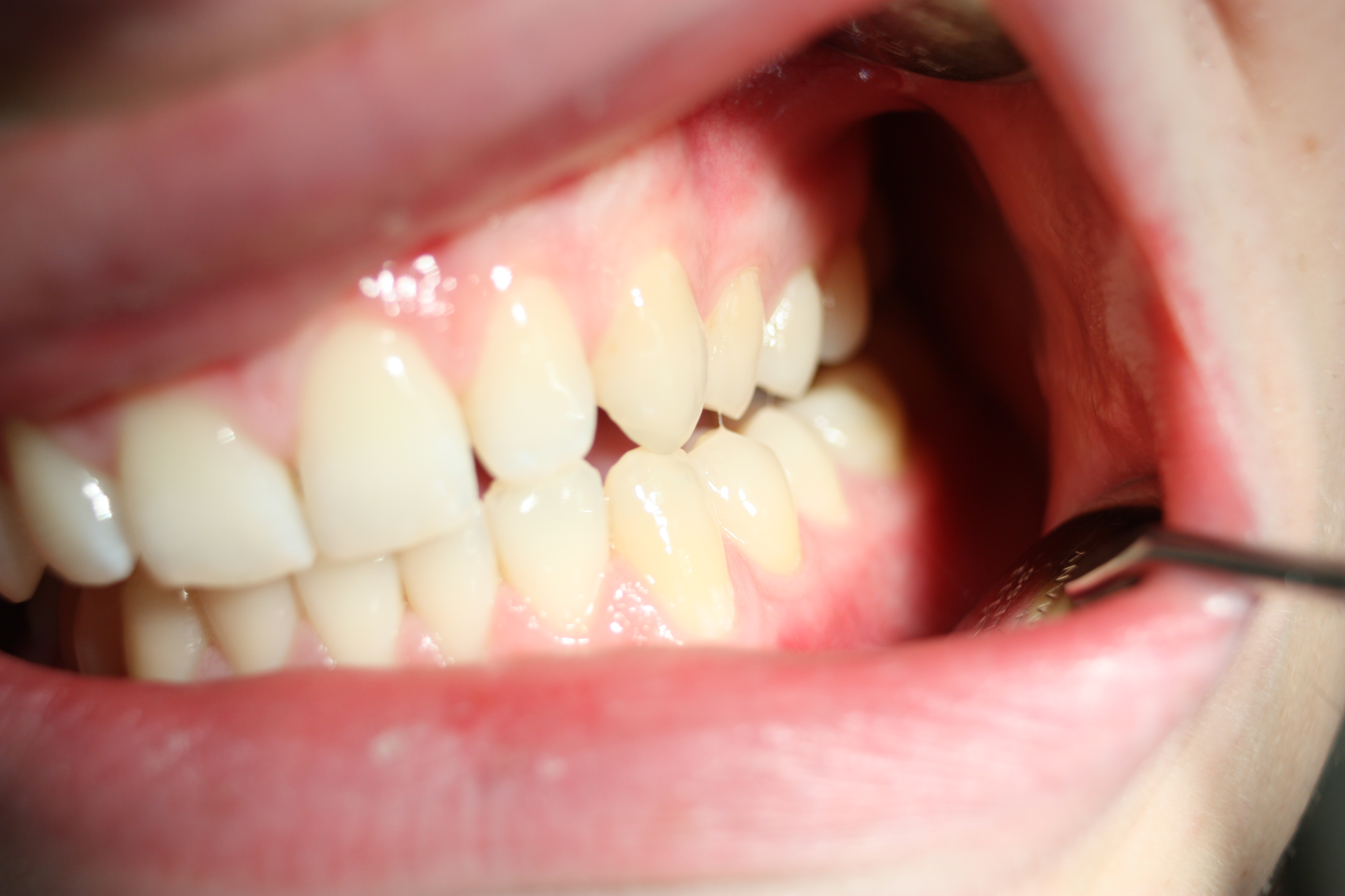 Eckzahnführung (Bildserie A und B)